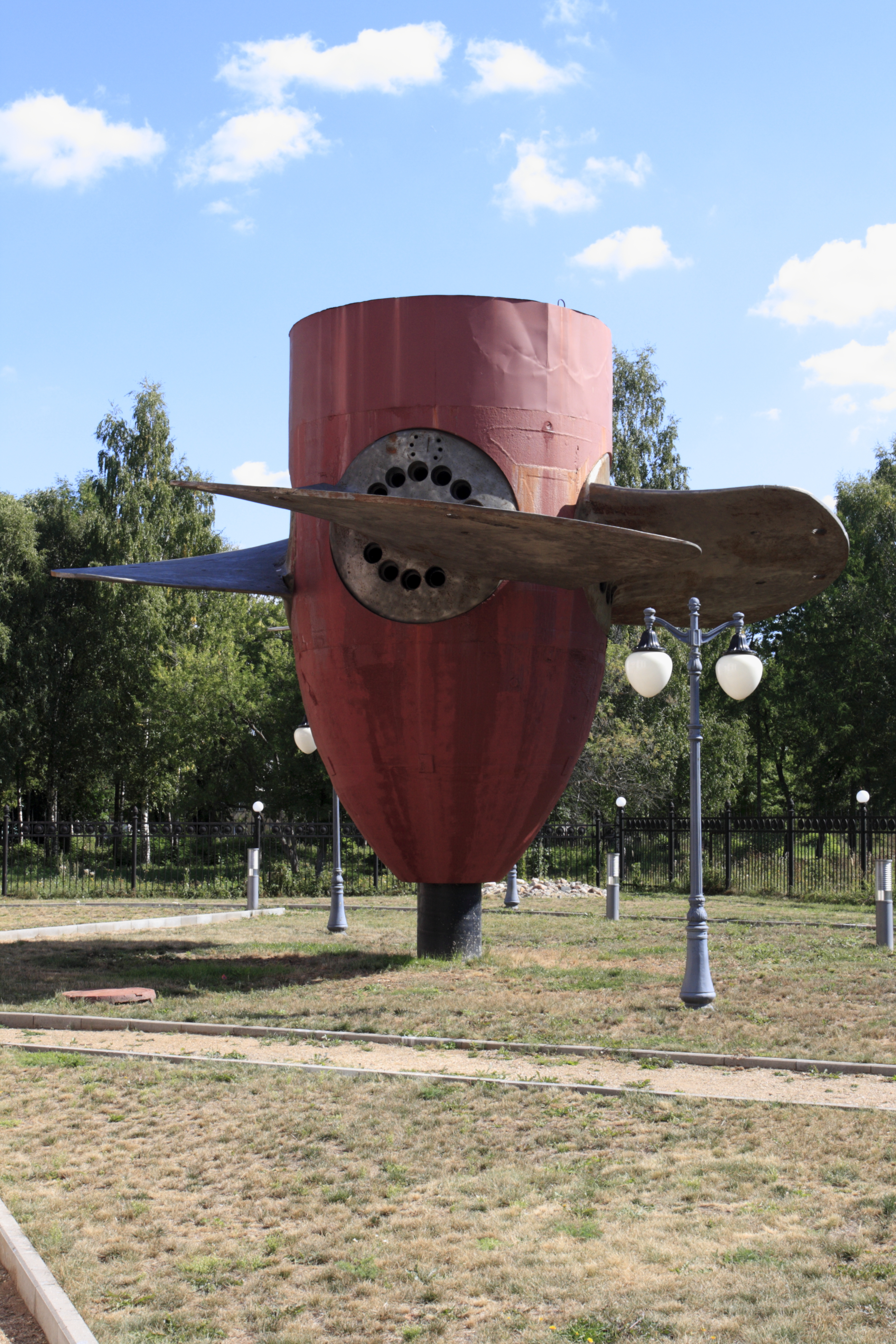 Демонтированная поворотно-лопастная турбина гидроагрегата №2 Угличской ГЭС, находится в музее истории гидроэнергетики. Вес - 120 тонн (40 тонн - корпус и 4 лопасти по 20 тонн каждая)